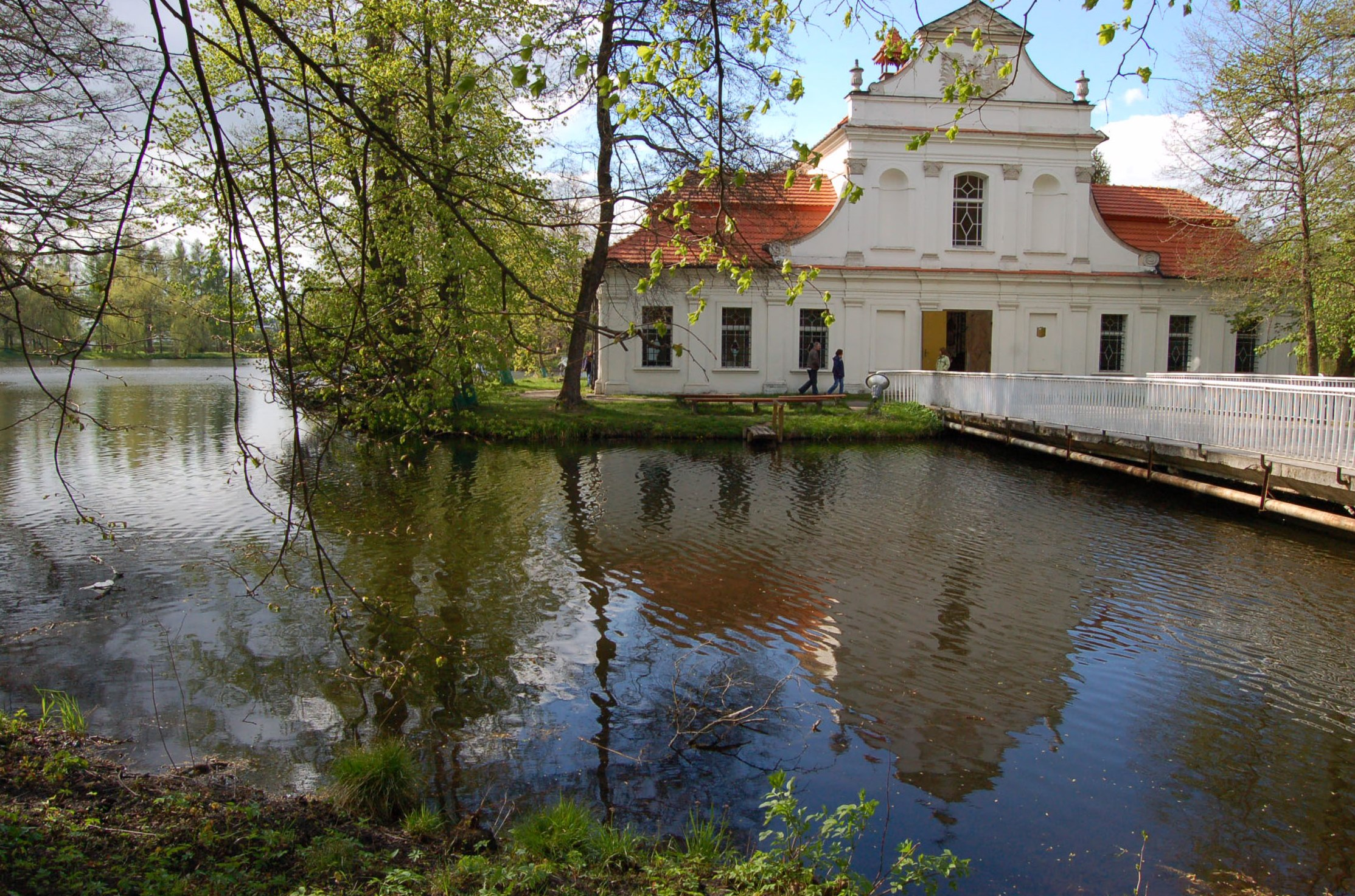 Zwierzyniec, ul. Browarna 2 - zespół kościoła pw. św. Jana Nepomucena "Na Wyspie" (XVIII-XX w.): kościół pw. św. Jana Nepomucena (zabytek nr A-260 z 8.04.1983) St.John's of Nepomuk Church on isle, Zwierzyniec, Poland (Lublin Voivodeship).